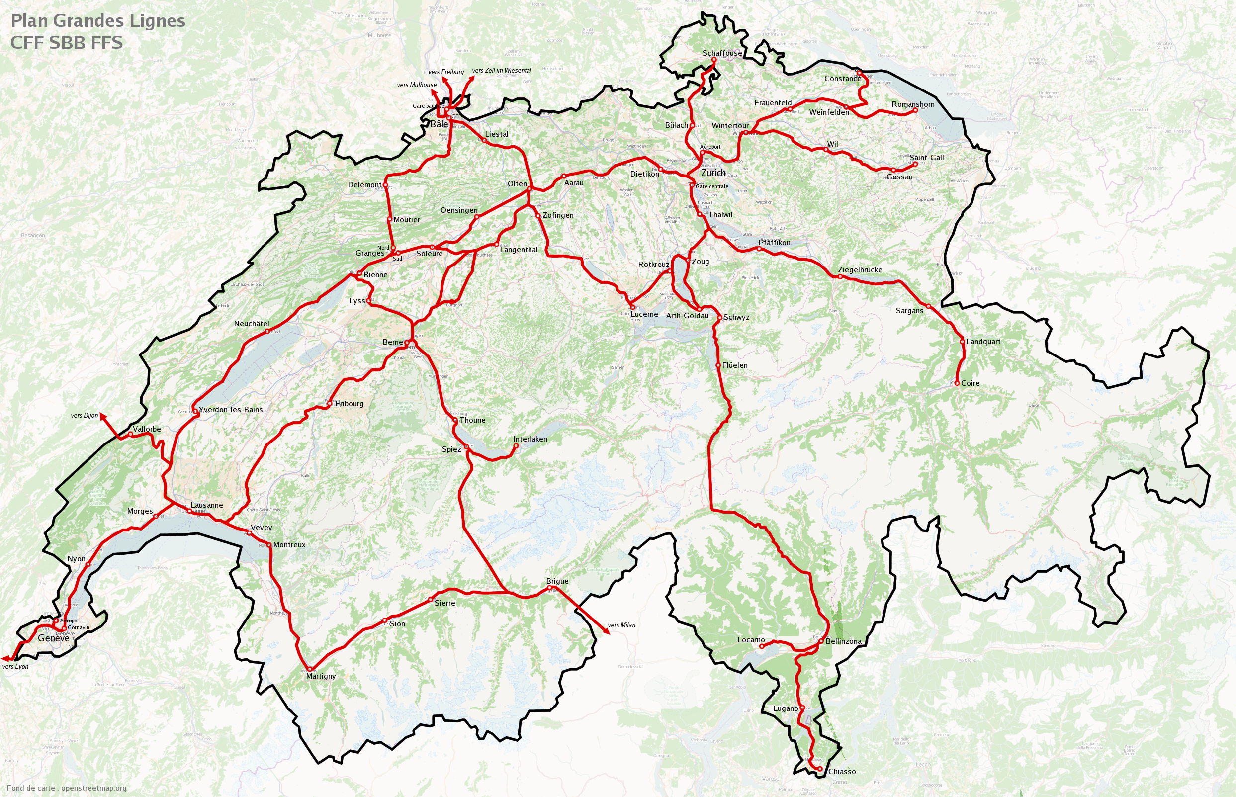 Plan des principales lignes de chemin de fer suisses